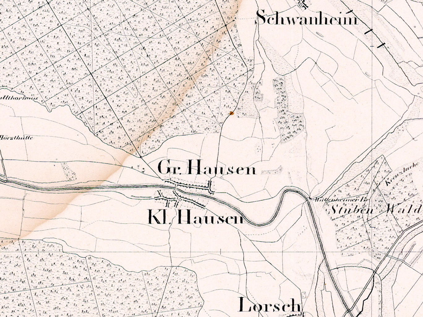 Historische Karte des Großherzogtums Hessen von 1832 bis 1850. Im Maßstab 1:50.000. Blatt 26: Worms. Ausschnitt mit Groß-Hausen und Klein-Hausen